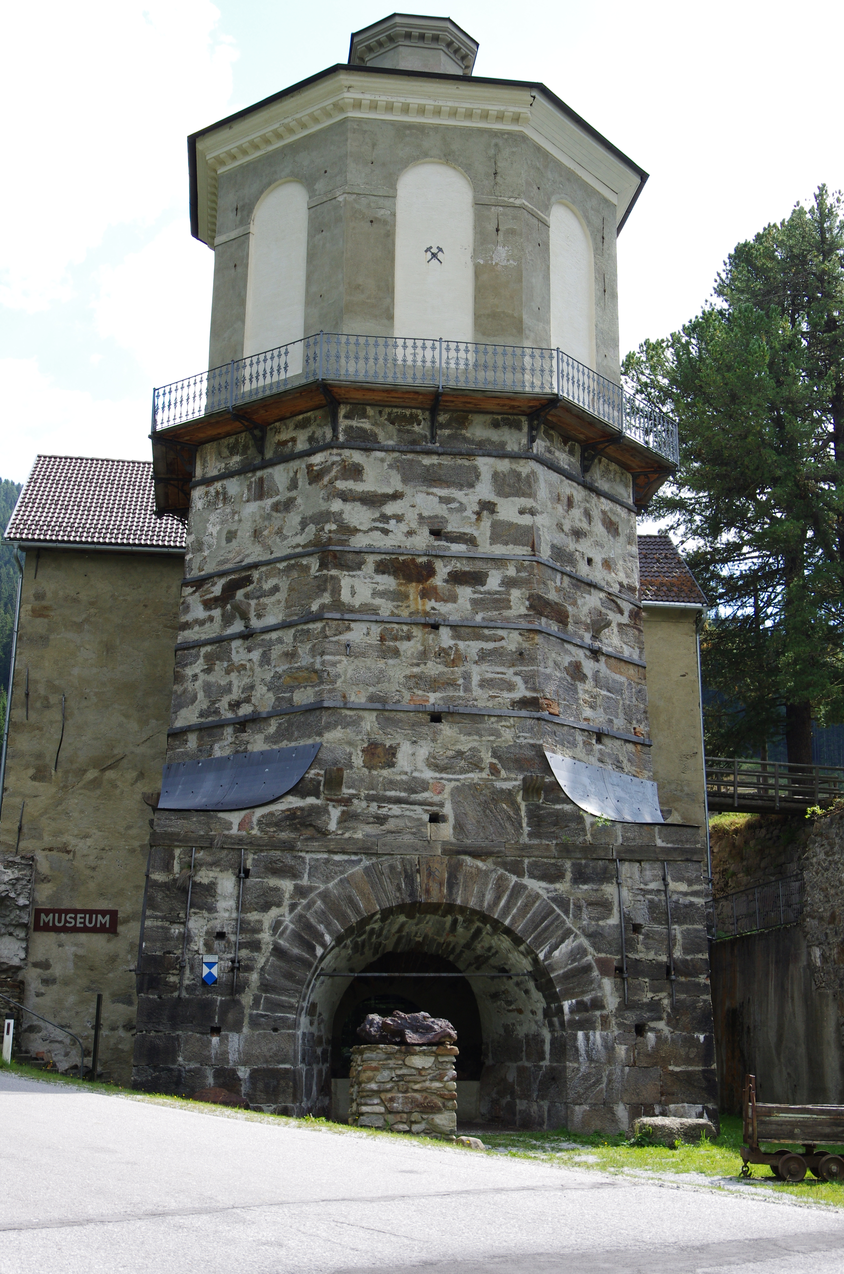 Hochofen